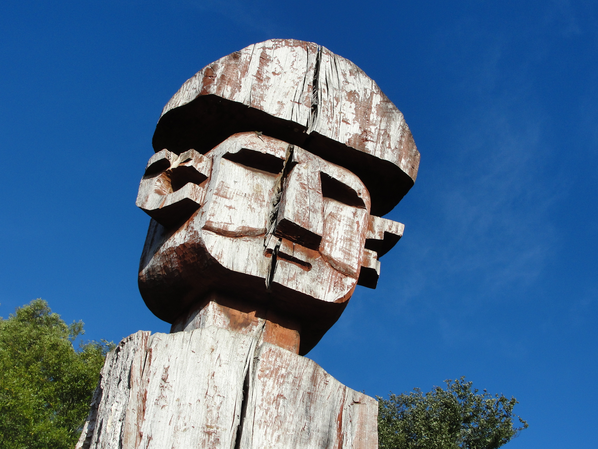 Monumento Natural Cerro Ñielol , IX Región de la Araucanía, Chile [?]